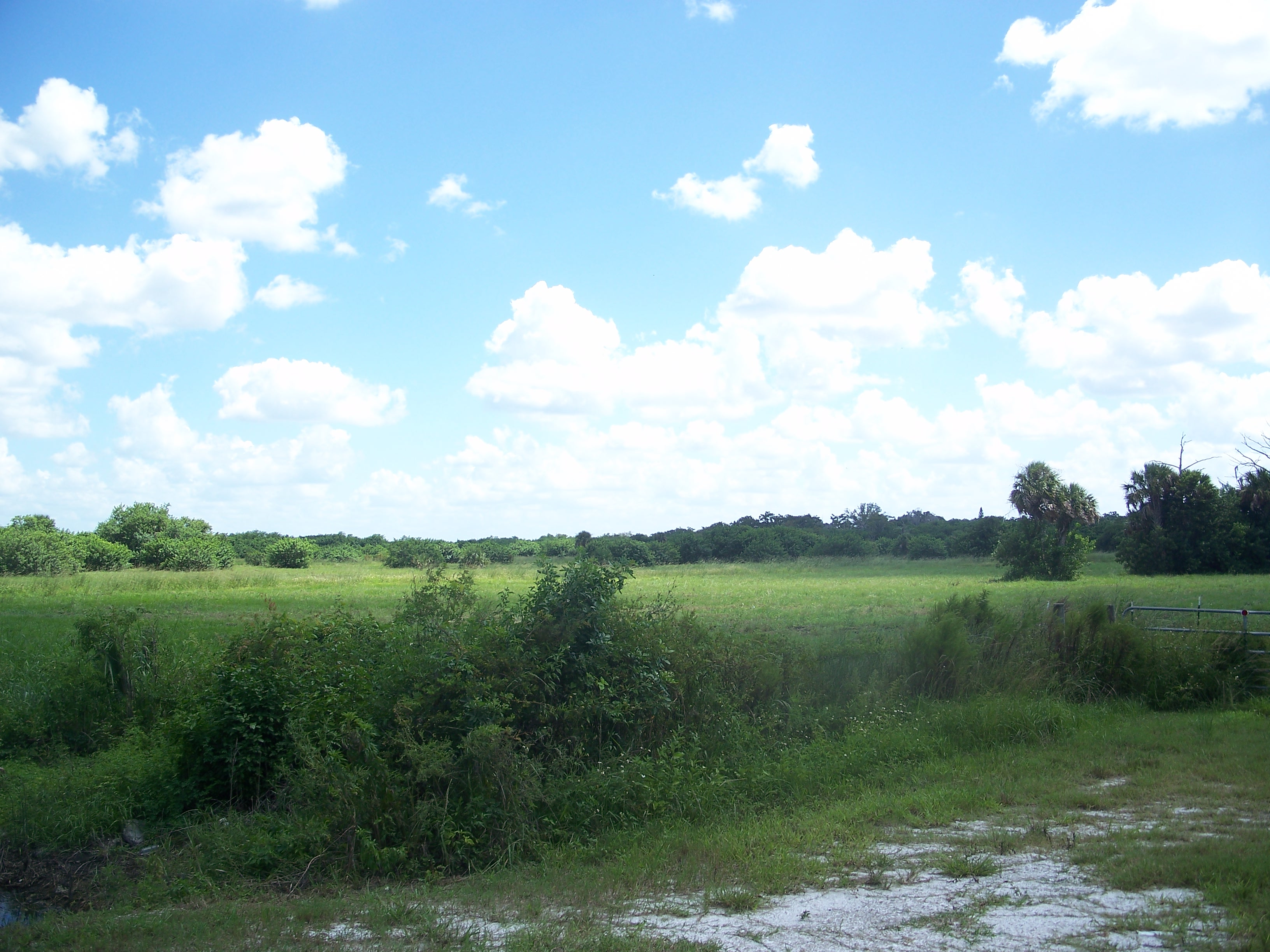 Okeechobee, Florida: Okeechobee Battlefield